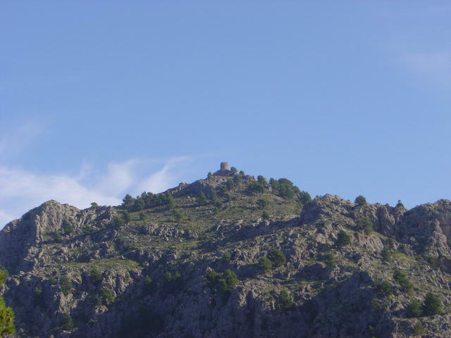 Torre de na Seca. Escorca. Mallorca.